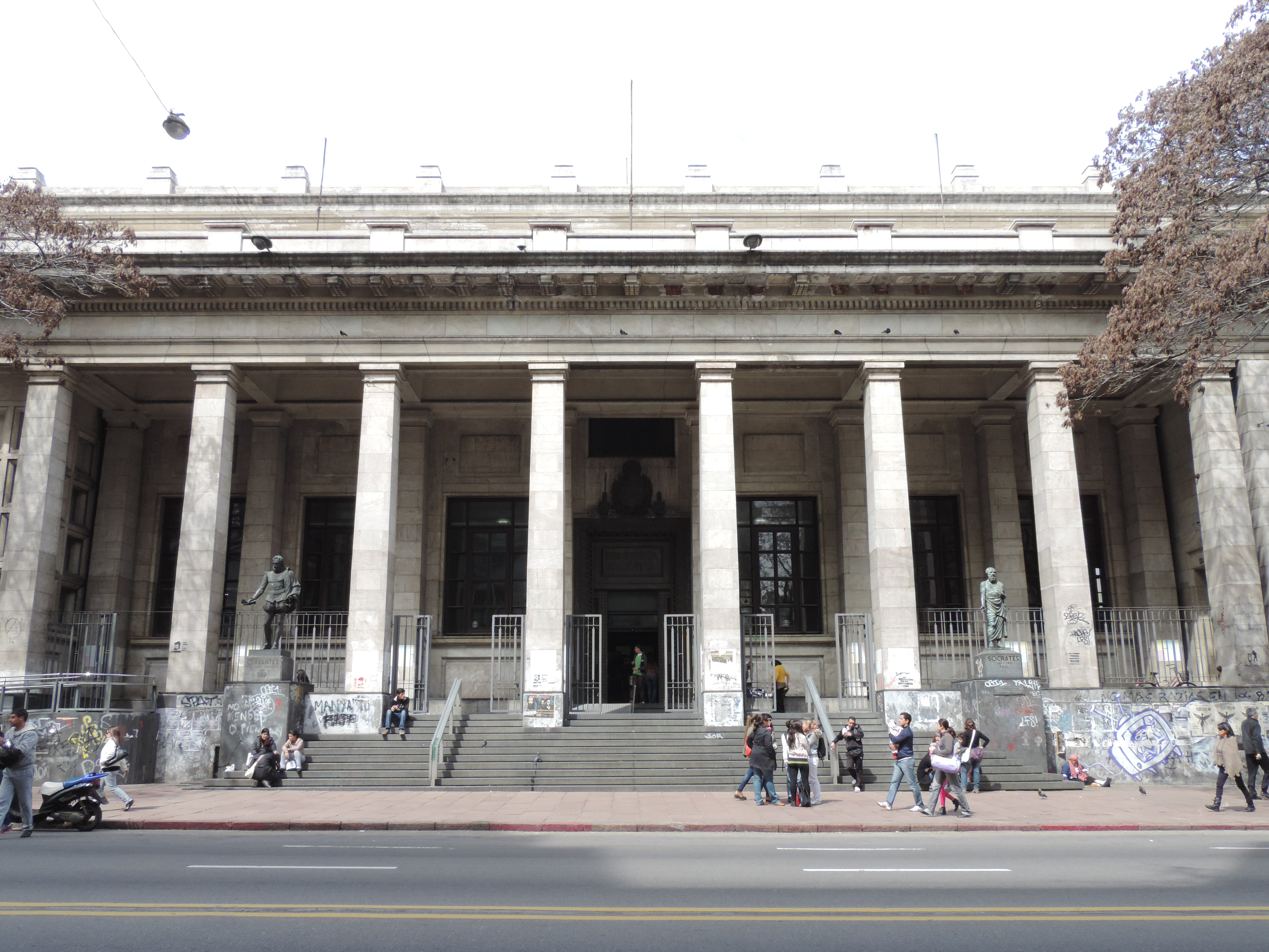 Biblioteca Nacional. Ubicada en el departamento de Montevideo